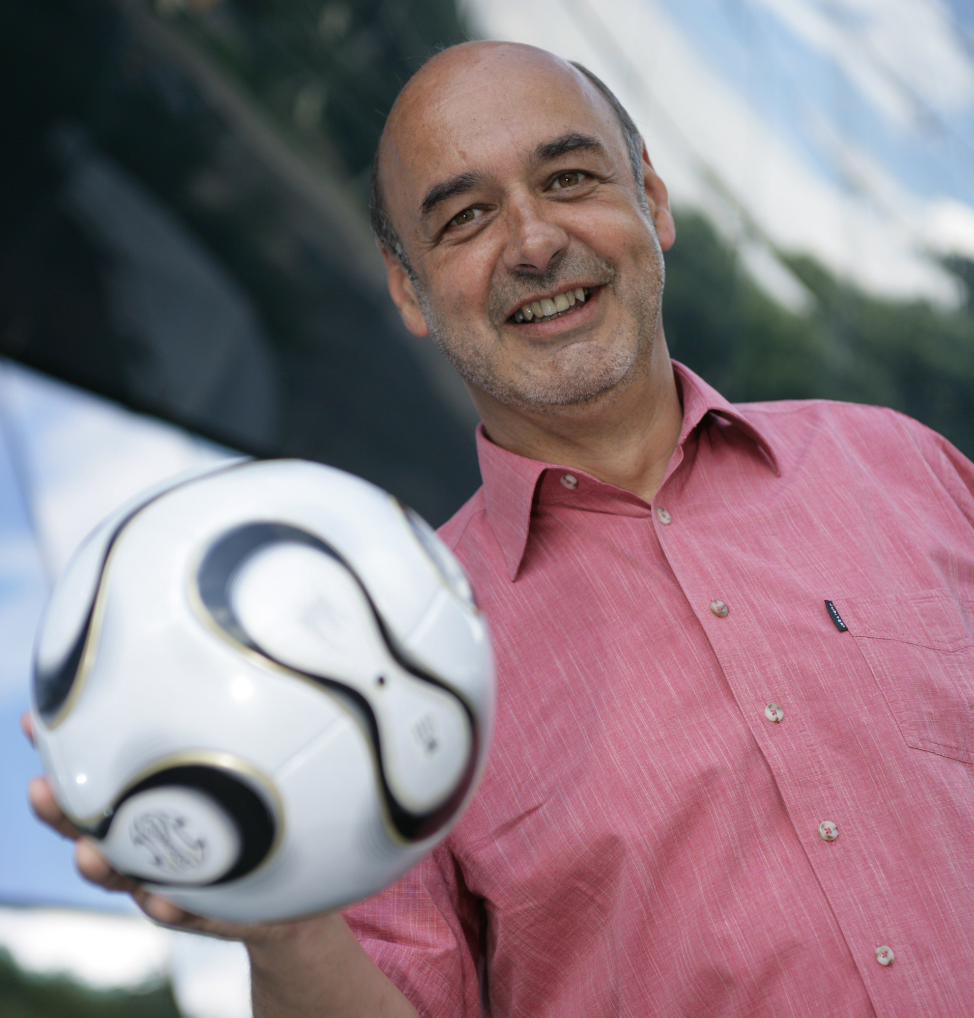 Porträt des steirischen Landesrat Manfred Wegscheider